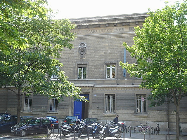 Jardin de l'Ecole Spéciale d'Architecture à Paris en France, avec au fond l'École Camondo.